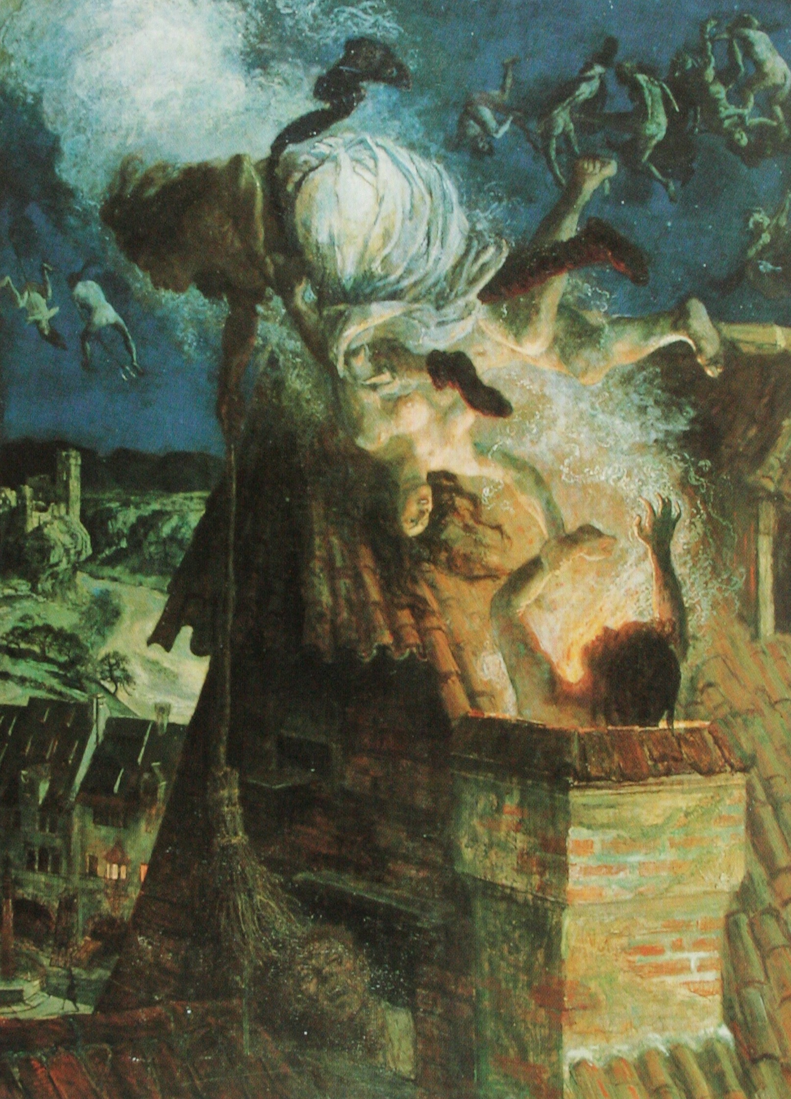 Walpurgisnacht, Gemälde von Albert Welti (1862-1912), 1896/97, 93 x 69 cm, Tempera auf Holz, Kunsthaus Zürich, Depositum der Gottfried Keller-Stiftung